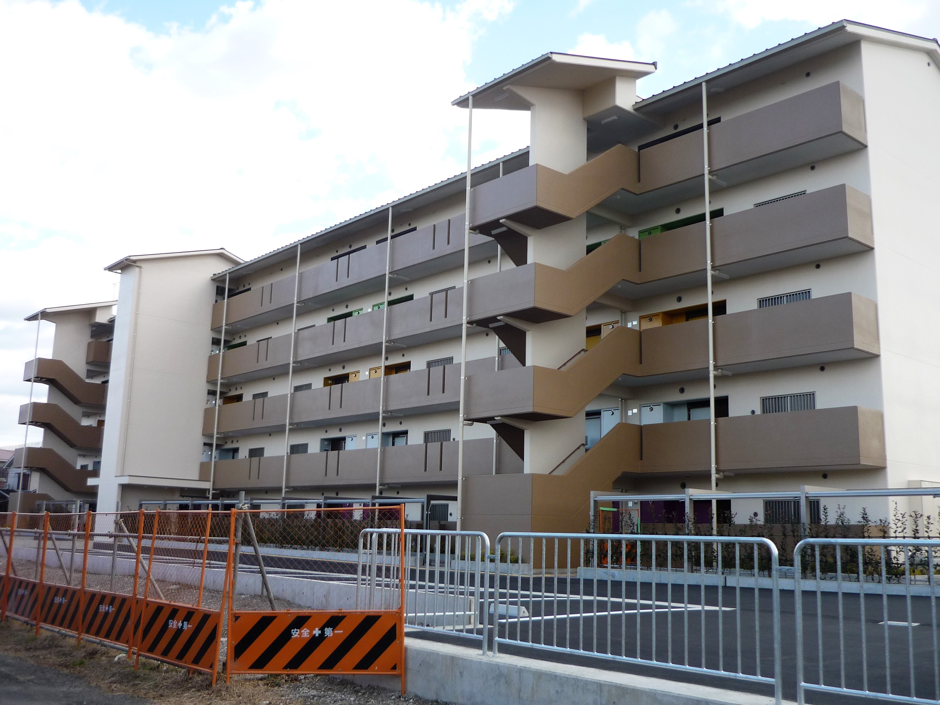 宇治市ウトロ地区に建設された市営住宅1期棟